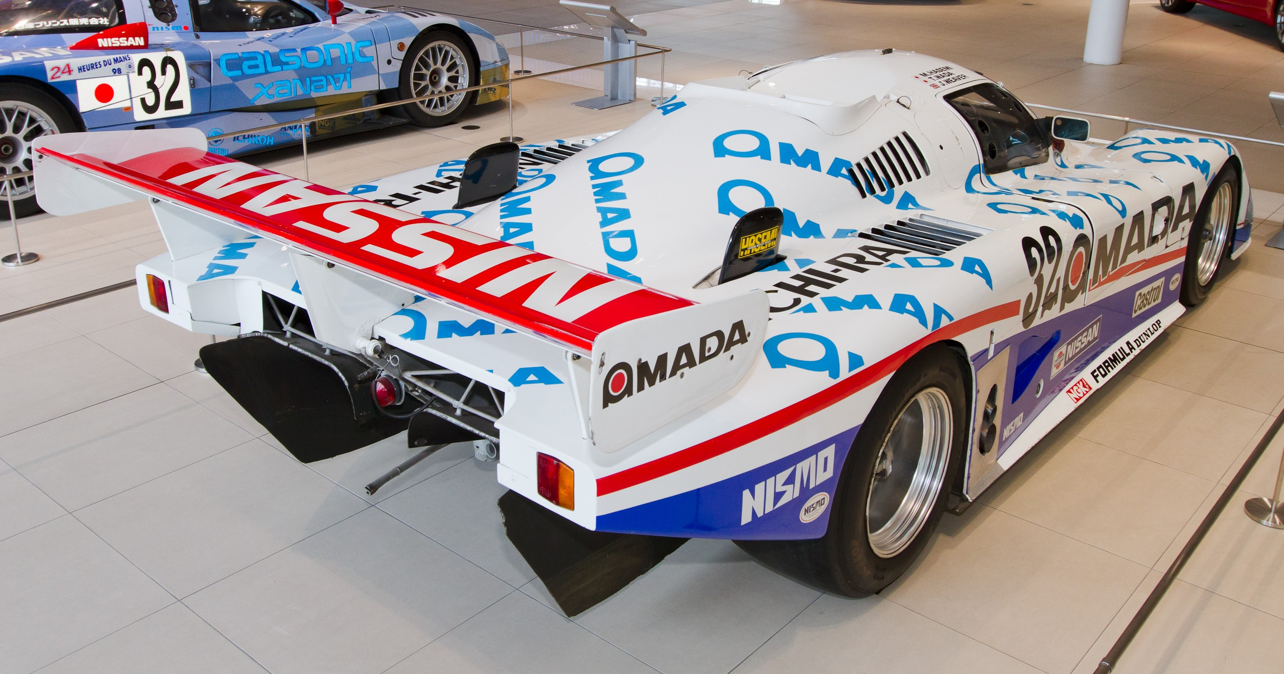 1986 Nissan 85V